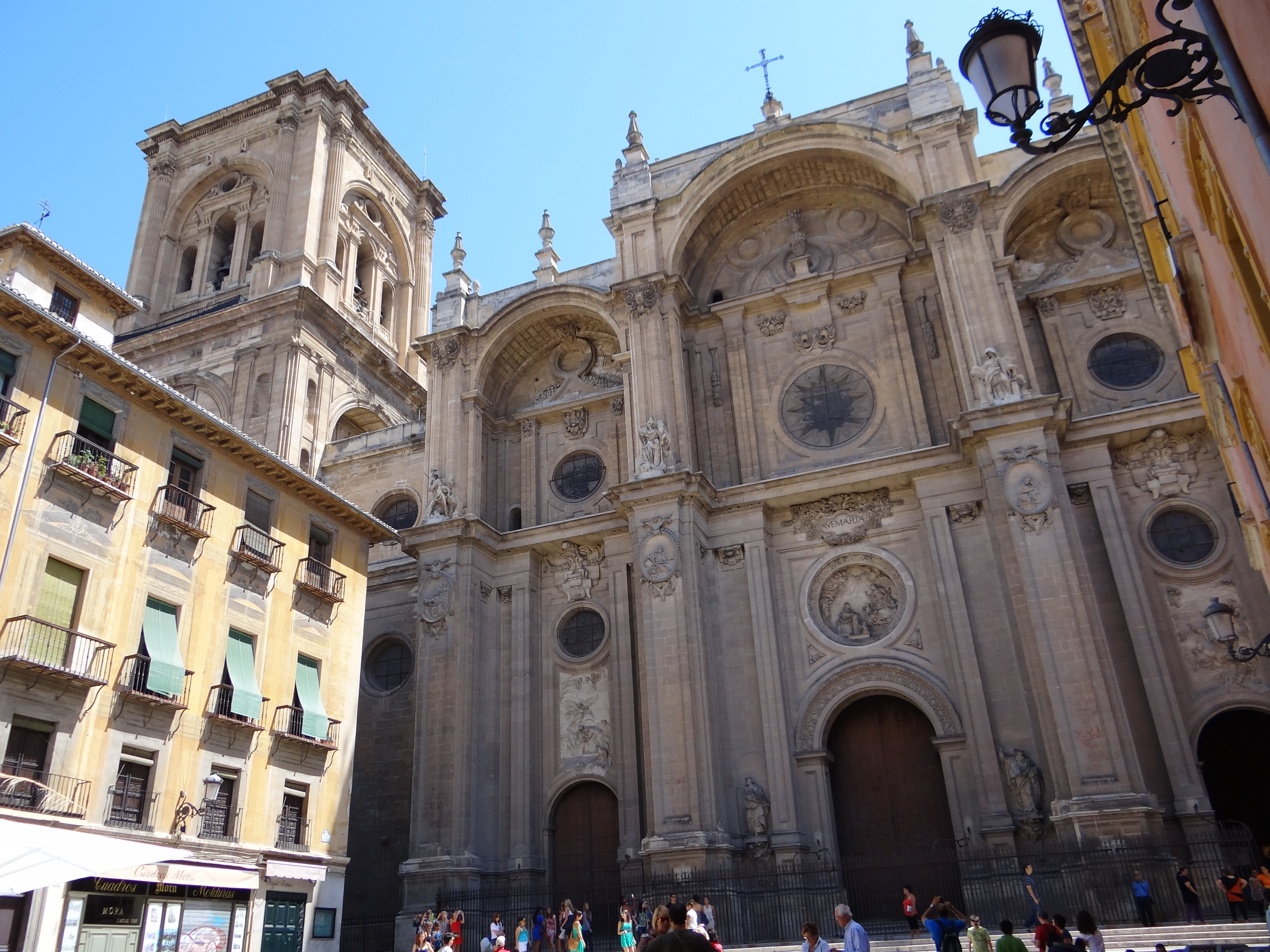 Plaza de las Pasiegas, con la catedral en primer plano.